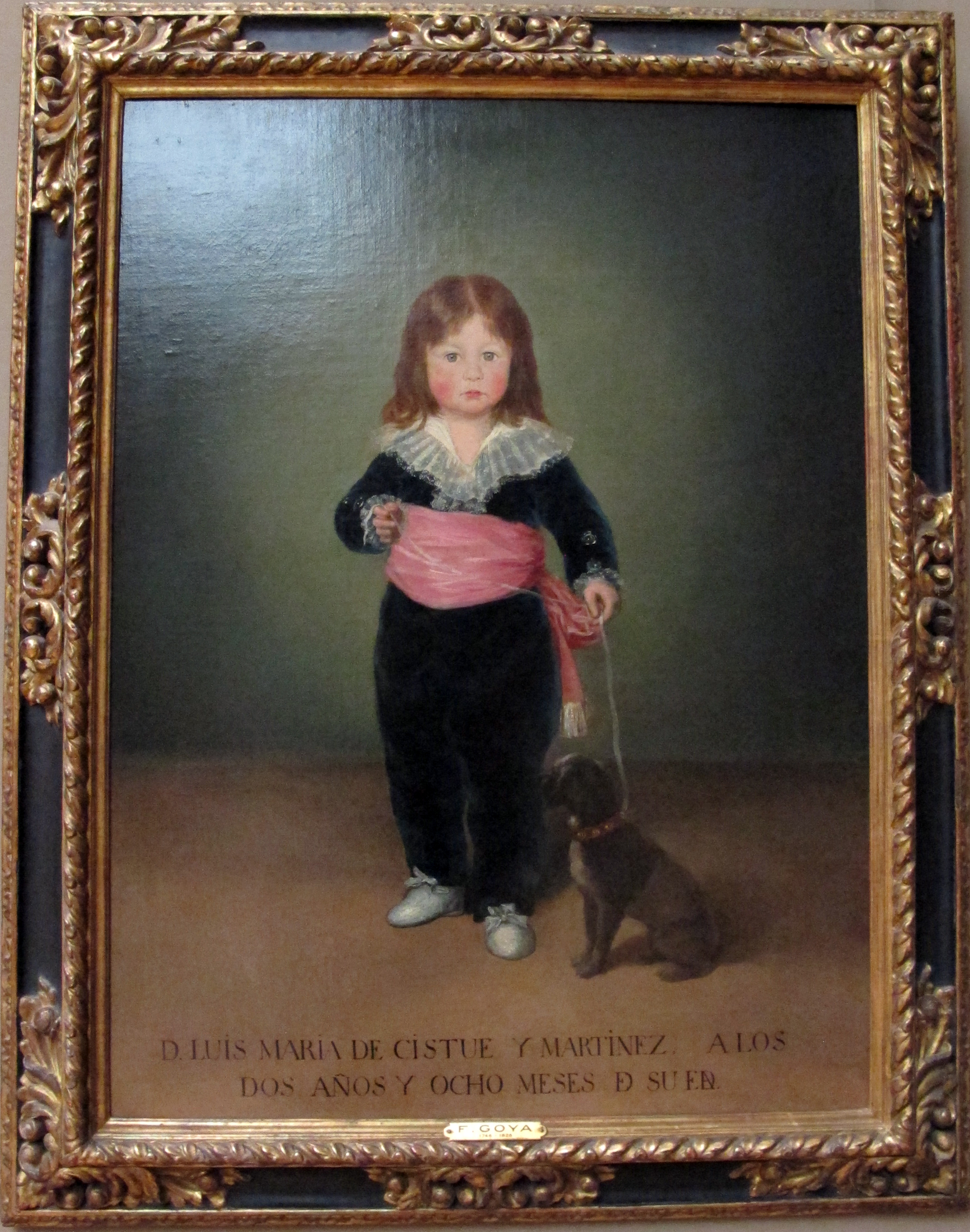 Pittura spagnola nel Louvre, Parigi